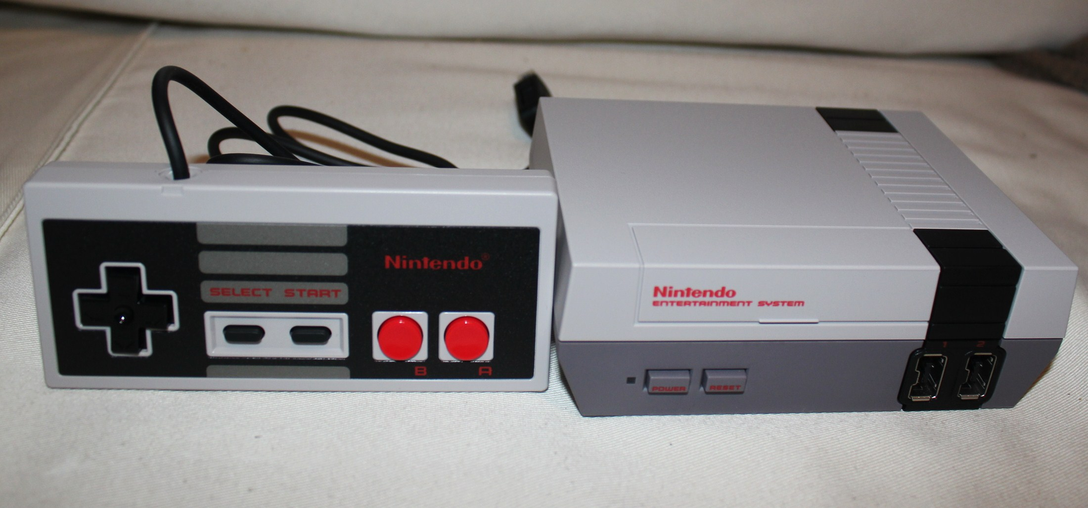 NES Classic Mini Konsole mit Controller